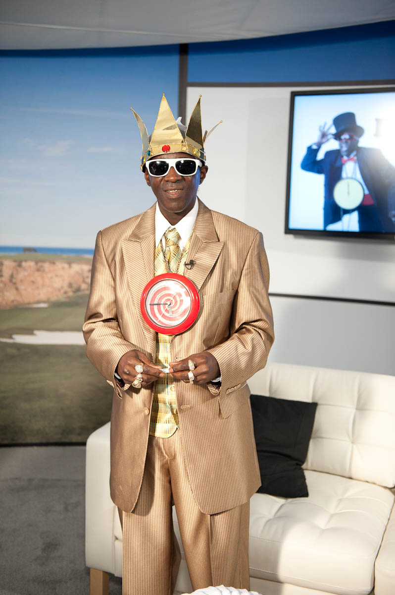 Flavor Flav